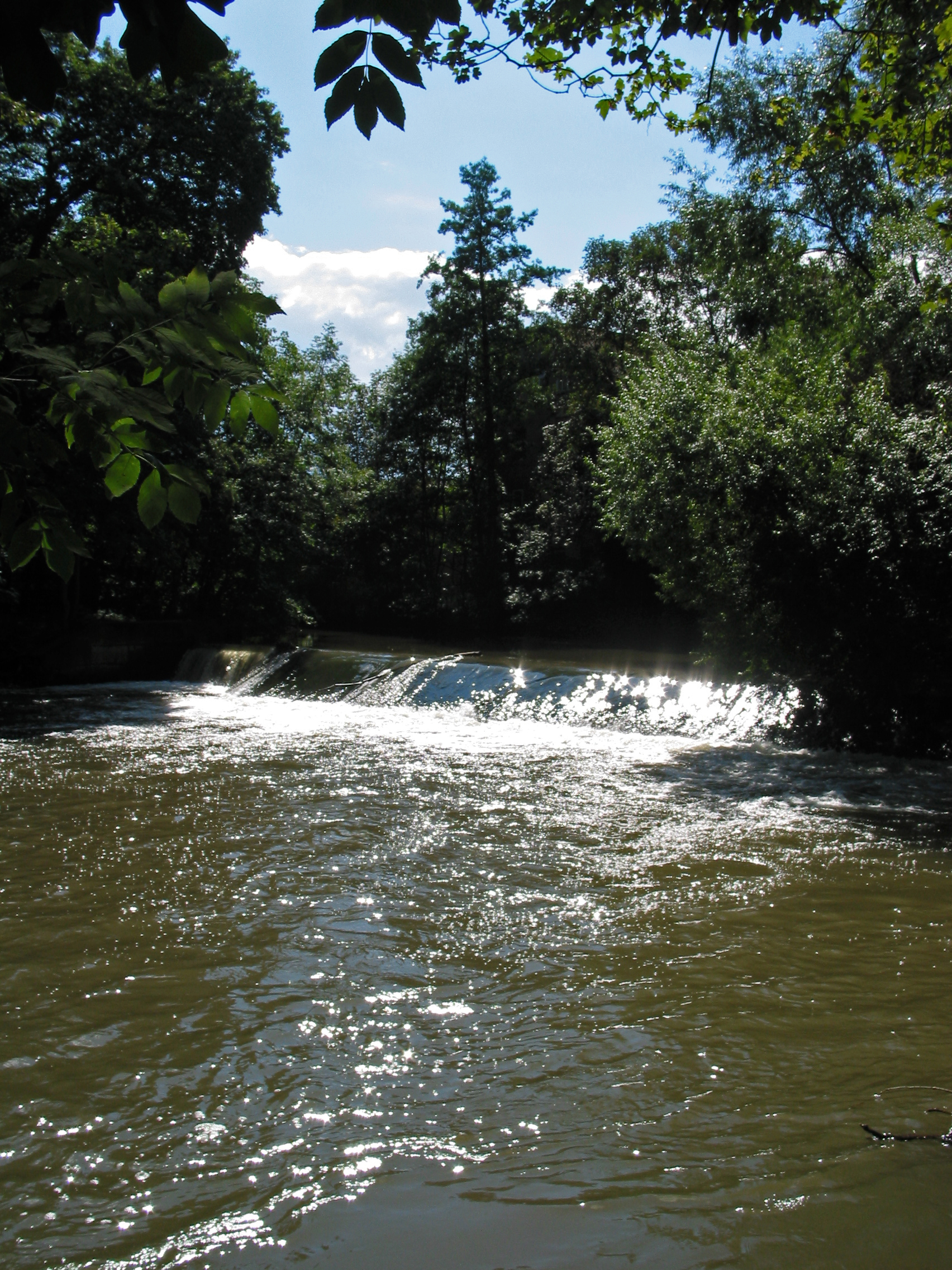 Blick auf das Ilm-Wehr der ehemaligen Karlsmühle in Weimar.